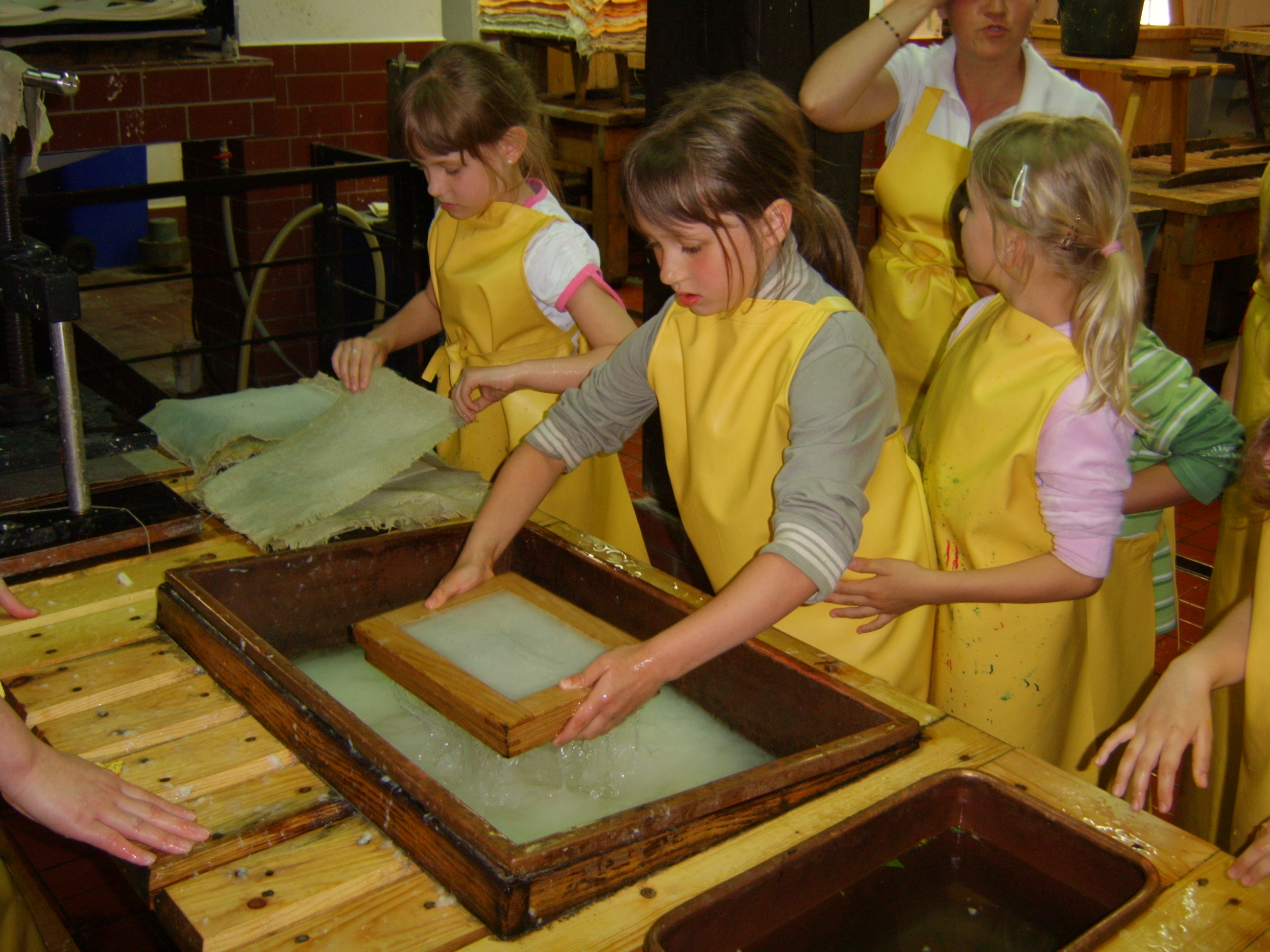 Muzeum Papiernictwa w Dusznikach-Zdroju – czerpanie papieru podczas zajęć z dziećmi